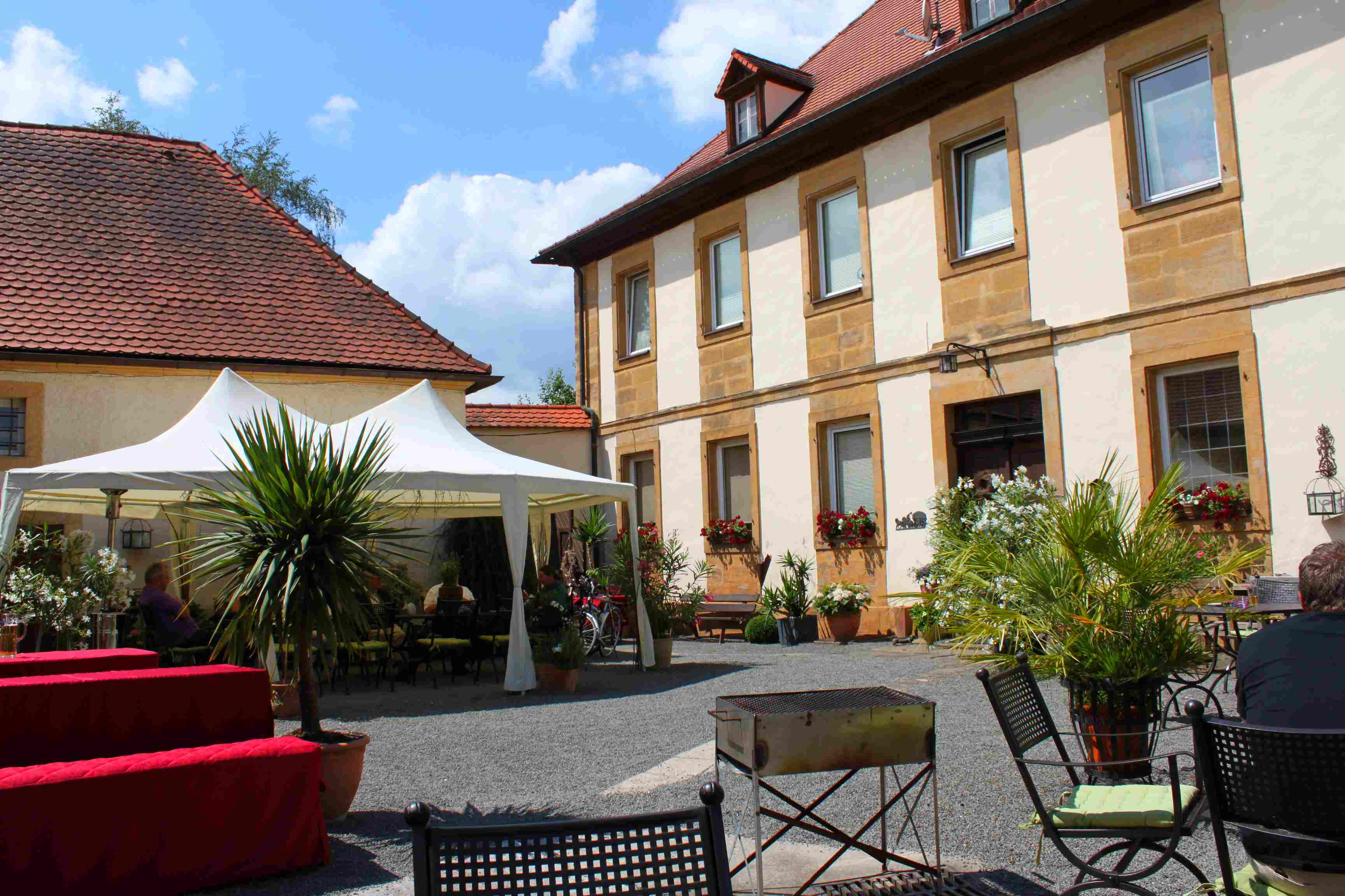 Innenhof von Schloss Maineck, Restaurant mit historischem Ambiente